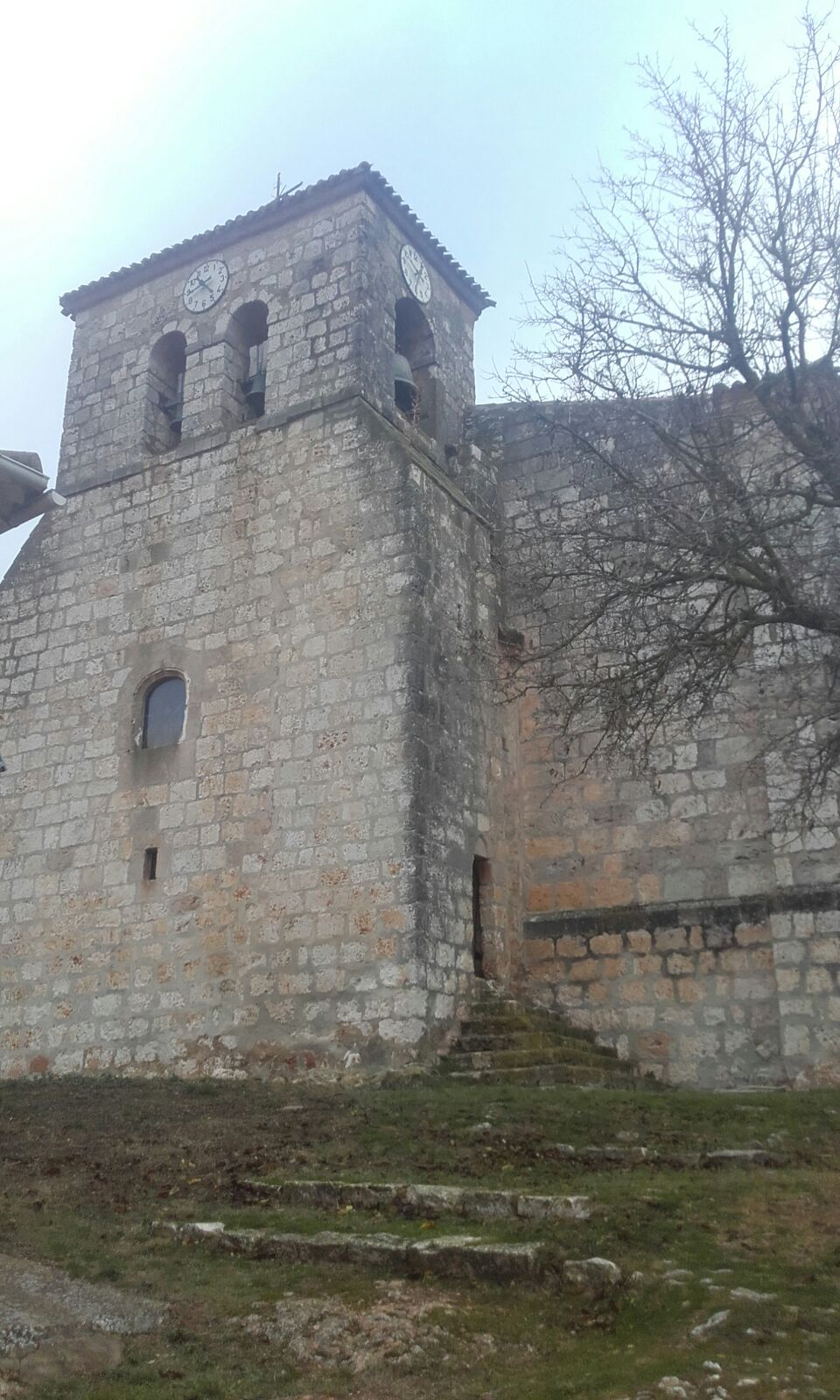 Exterior iglesia de Zael